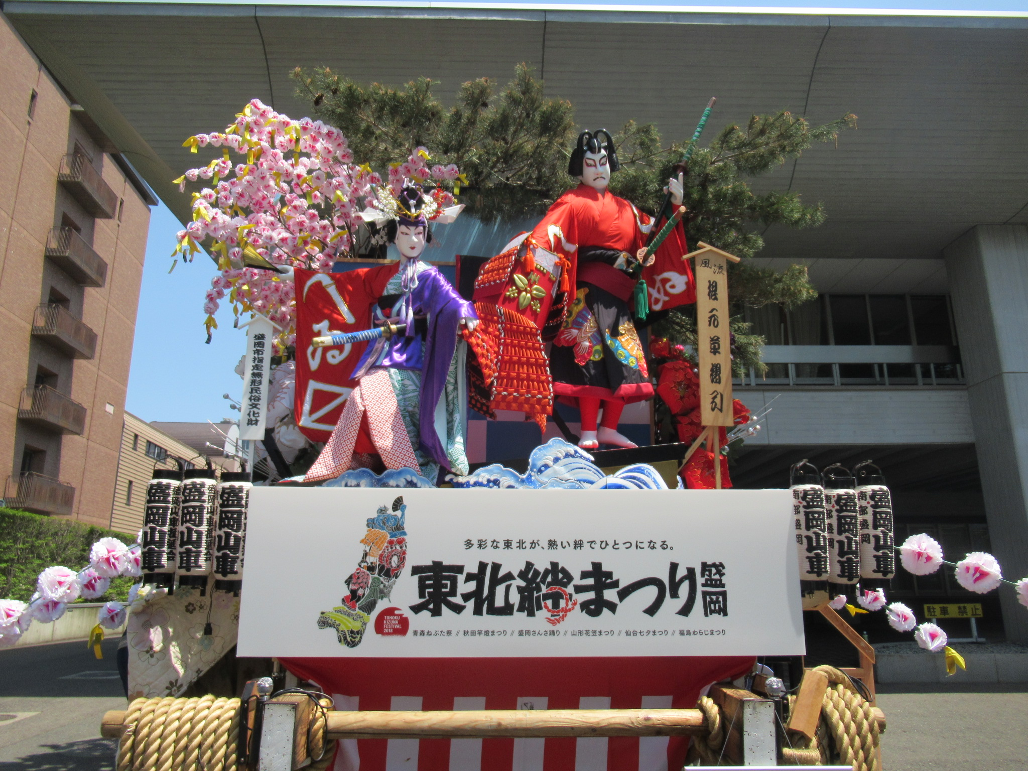 2018年撮影。